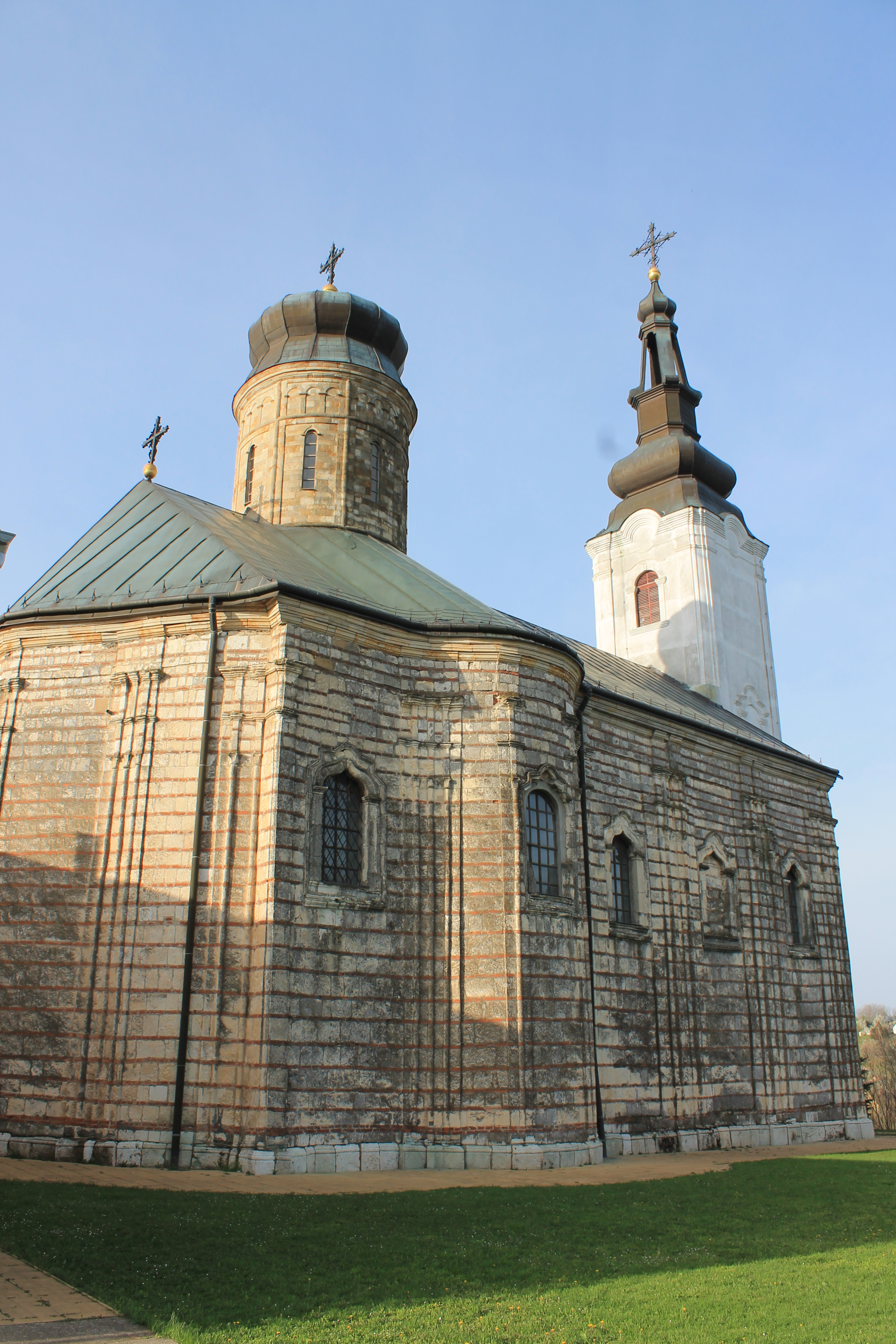 Manastir Šišatovac